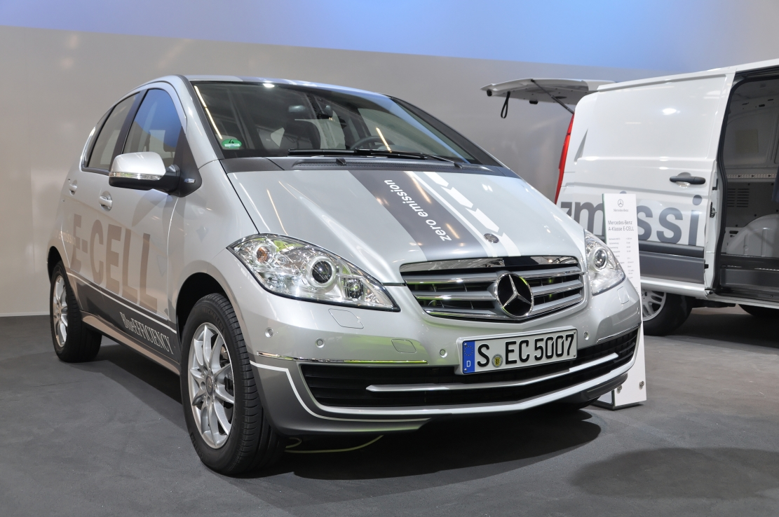 Messe i-Mobility 2012 in Stuttgart Dieses Foto entstand durch Unterstützung des gemeinnützigen Vereins Skillshare.eu Skillshare e.V. ist ein eingetragener gemeinnütziger Verein zur Förderung der Bildung durch Unterstützung der Erstellung, Sammlung und Verbreitung so genannten freien Wissens. IBAN: DE16 8306 5408 0004 8850 66 BIC: GENODEF1SLR Bank: VR-Bank Altenburger Land